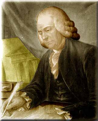 Jean-François Séguier, retrat